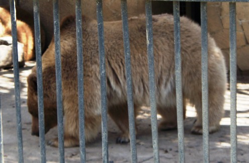 бурый медведь в бакинском зоопарке